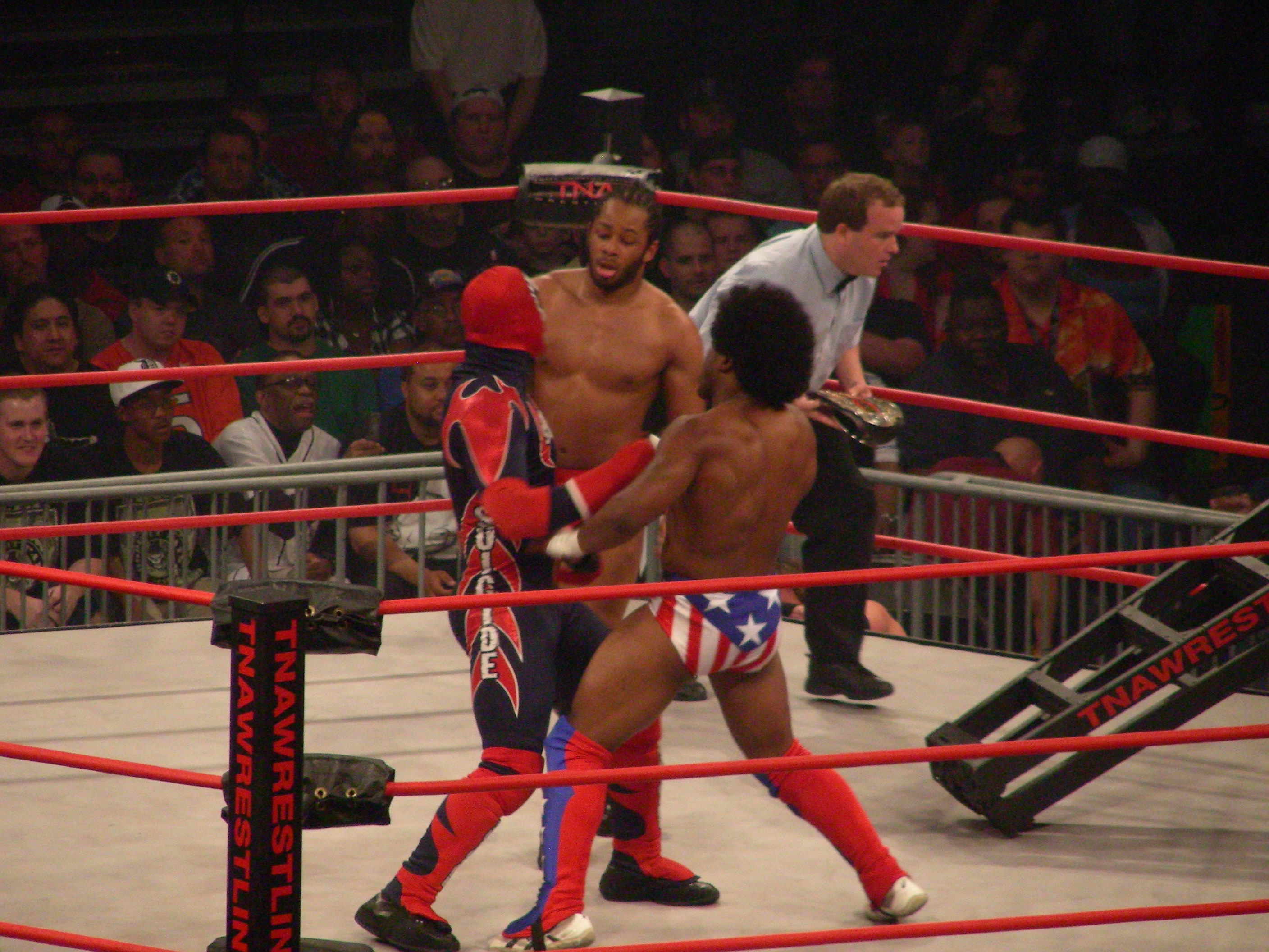 Lethal Consequences double team on Suicide